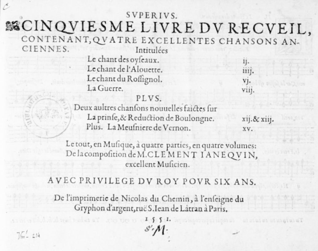 Title page of Janequin's Cinquième livre du recueil (Paris, 1551).